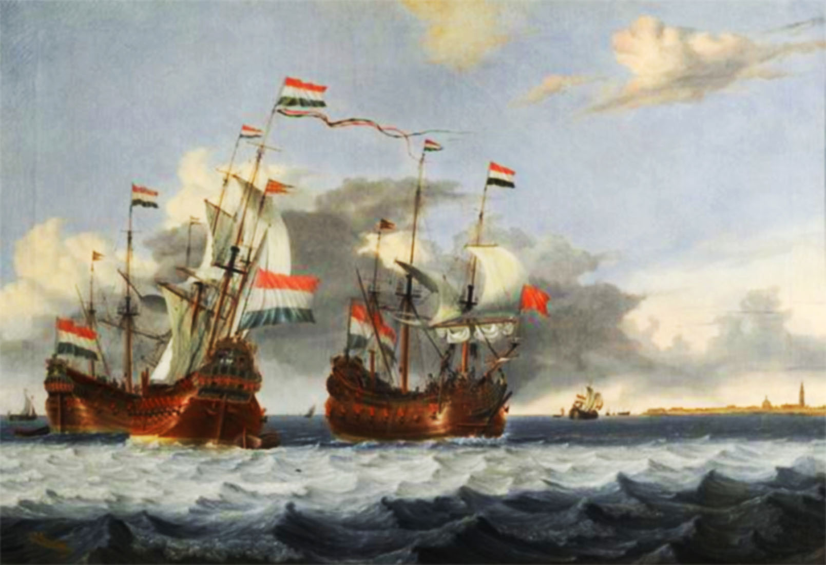 View on Enkhuizen.